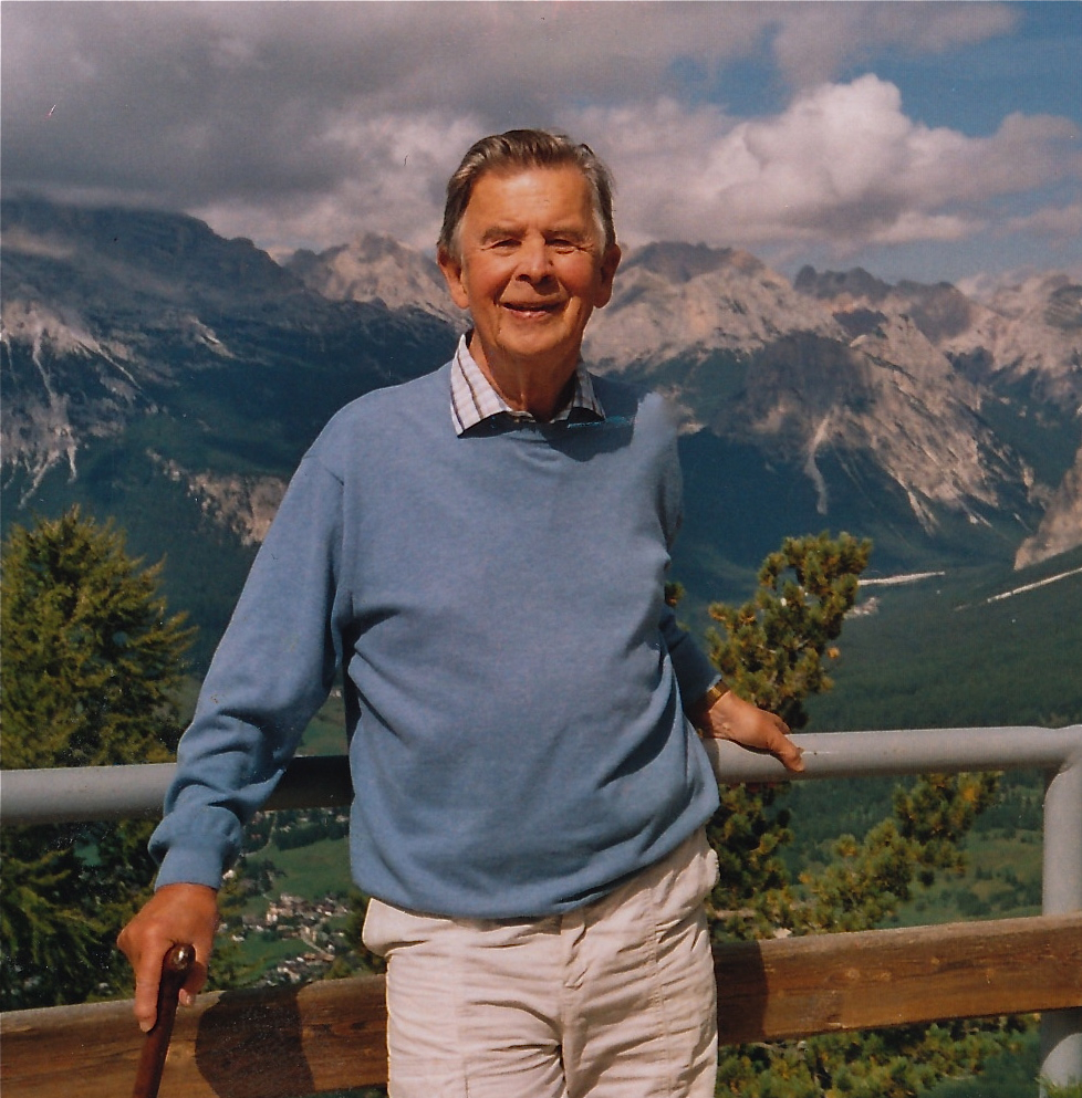 Aage Møst (1923-2011)